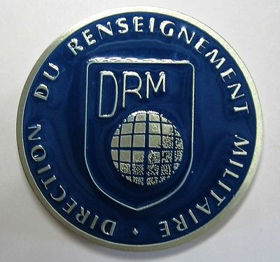 Insigne de la DRM sur Coin's.